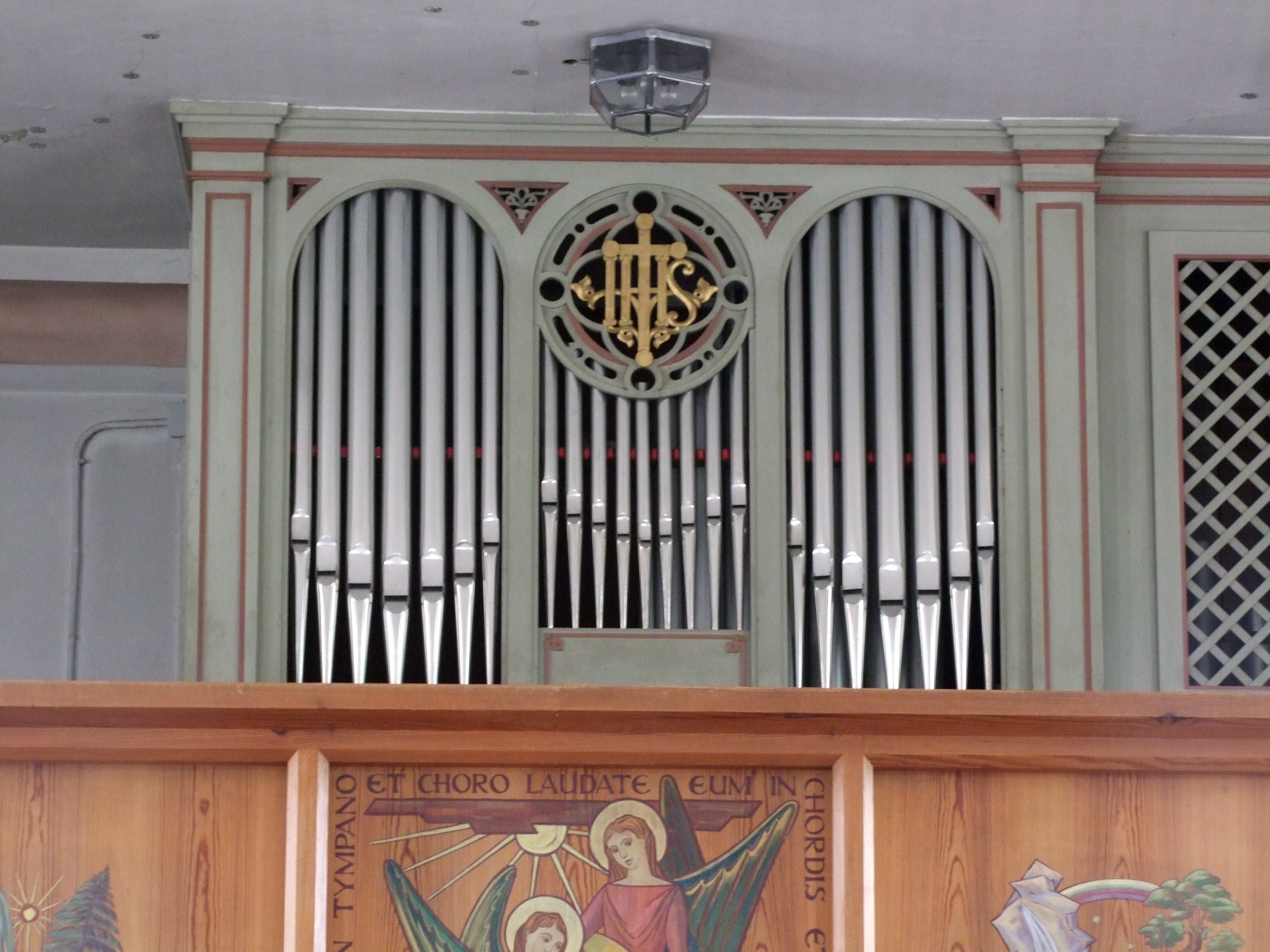 St. Margareta im oberschwäbischen Irsingen, einem Ortsteil von Türkheim in Bayerisch/Schwaben